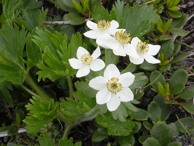 エゾノハクサンイチゲ (北海道大雪山) Anemone narcissiflora var. sachalinensis (Mt.Daisetsu, Hokkaido, Japan)